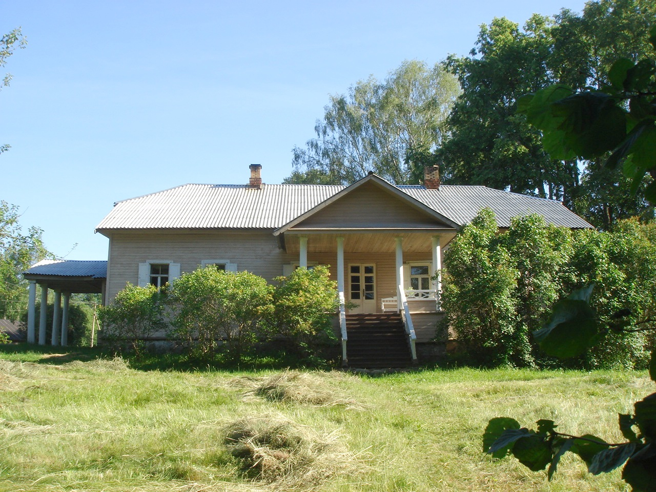 Усадьба писательницы Алтаевой-Ямщиковой М.В. (филиал музея-заповедника) (Псковская область, п/о Лосицы)